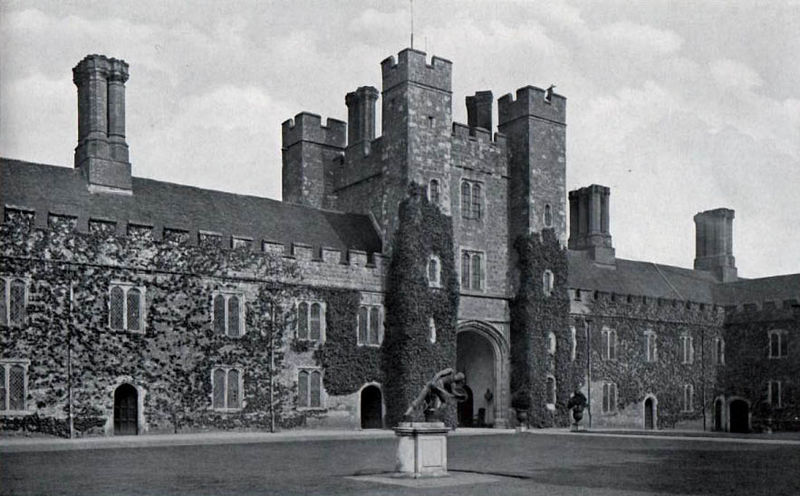 Knole - Green Court Image:Knole - Green Court from English Homes by H Avray Tipping (died 1933) edited.jpg